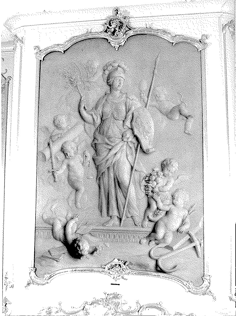 Grisaille van Minerva omringt door Putti.